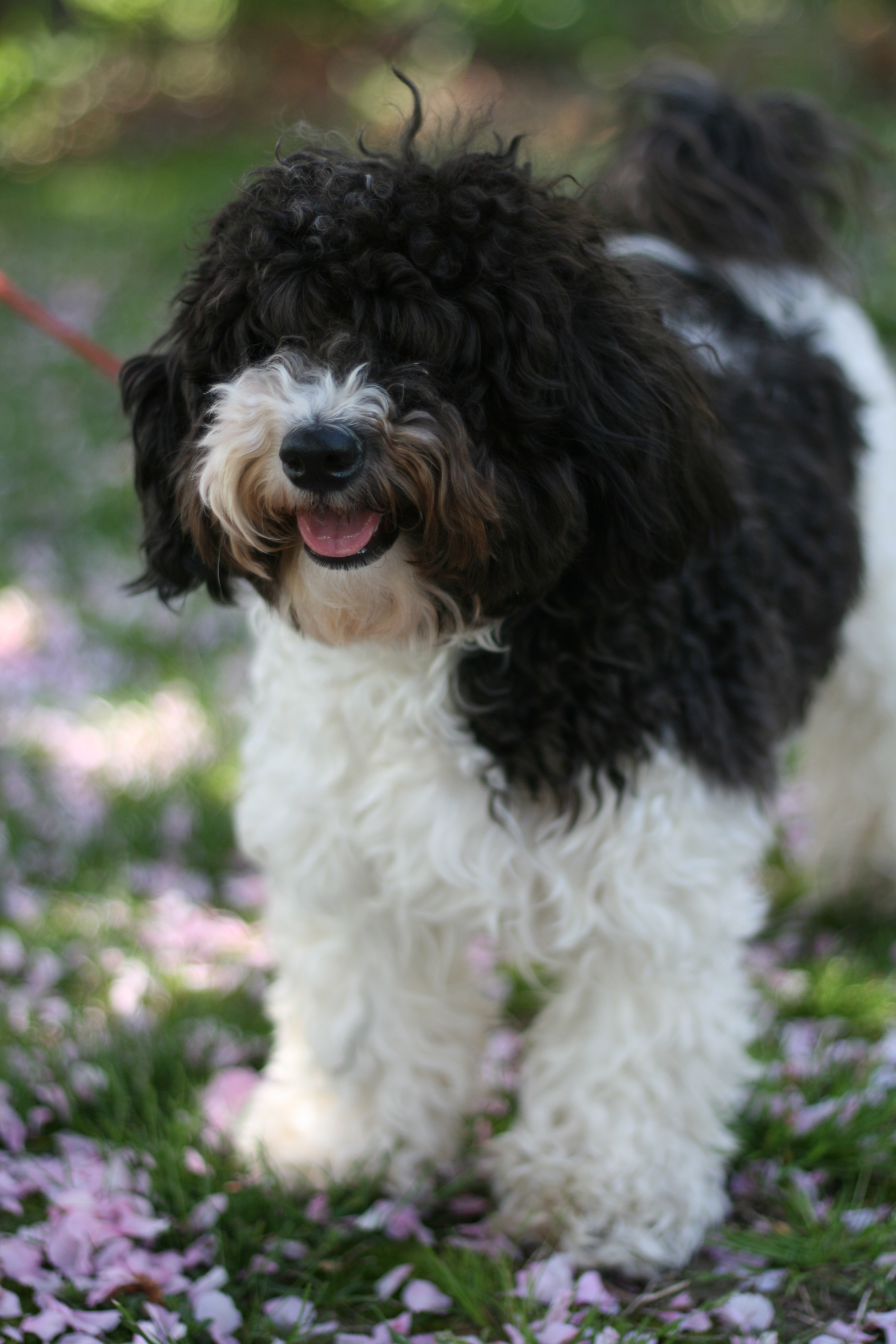 A Havanese named Lizzie.